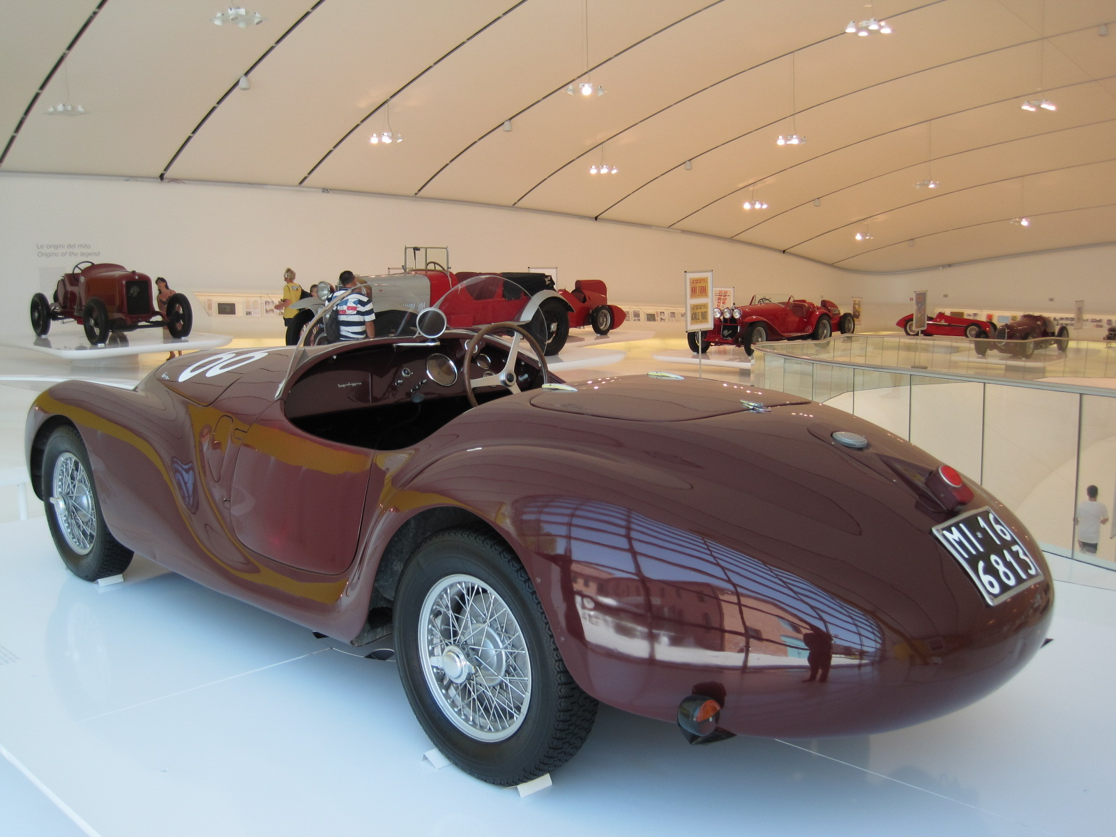 Automobiles in Enzo Ferrari Museum in Modène - Auto Avio Costruzioni 815 - 1940